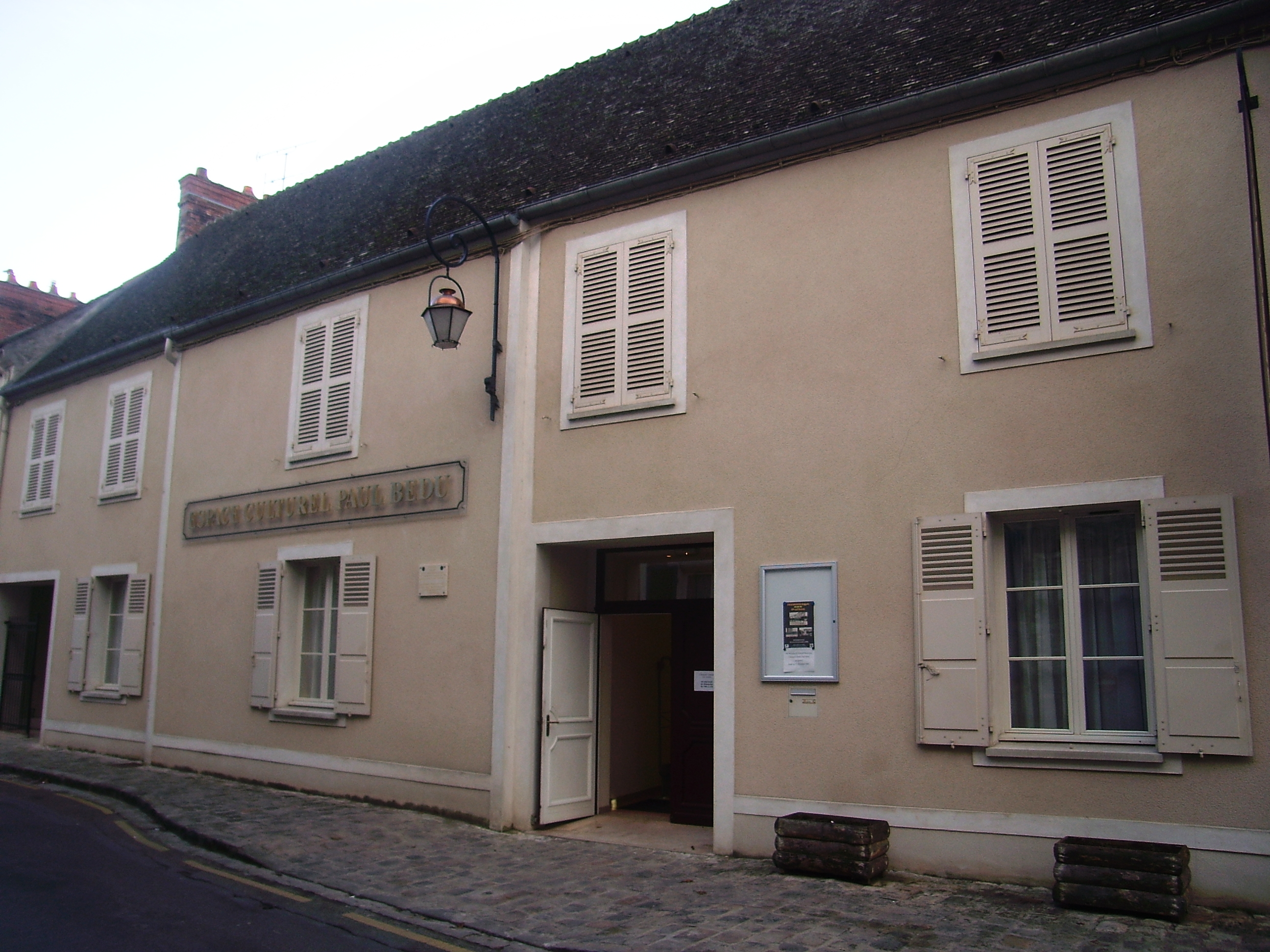 Espace culturel Paul Bédu à Milly-la-Forêt (91)